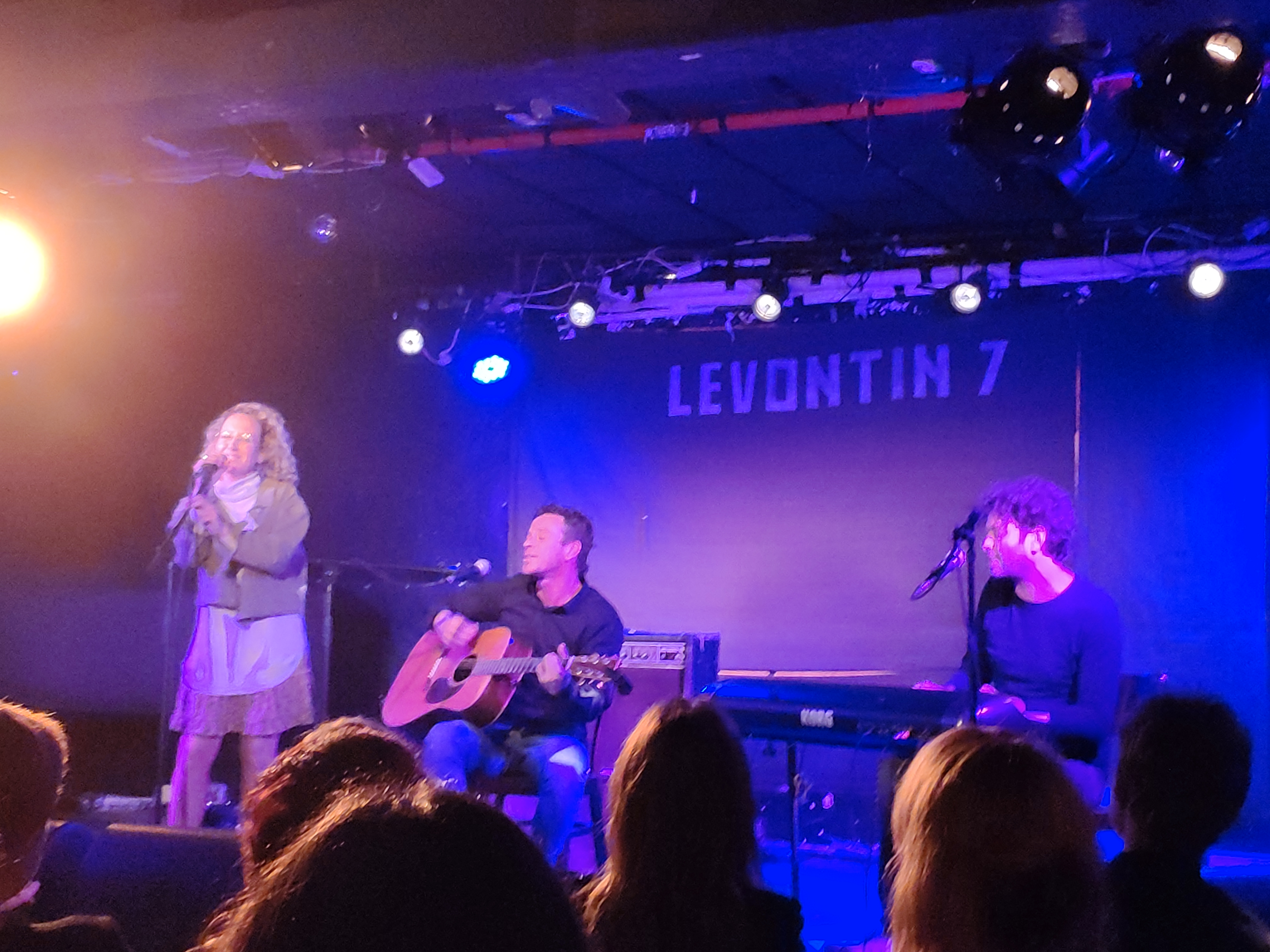 גדי רונן, בועז ריינשרייבר ומור שטייגל בהופעה בלבונטין 7, ינואר 2020